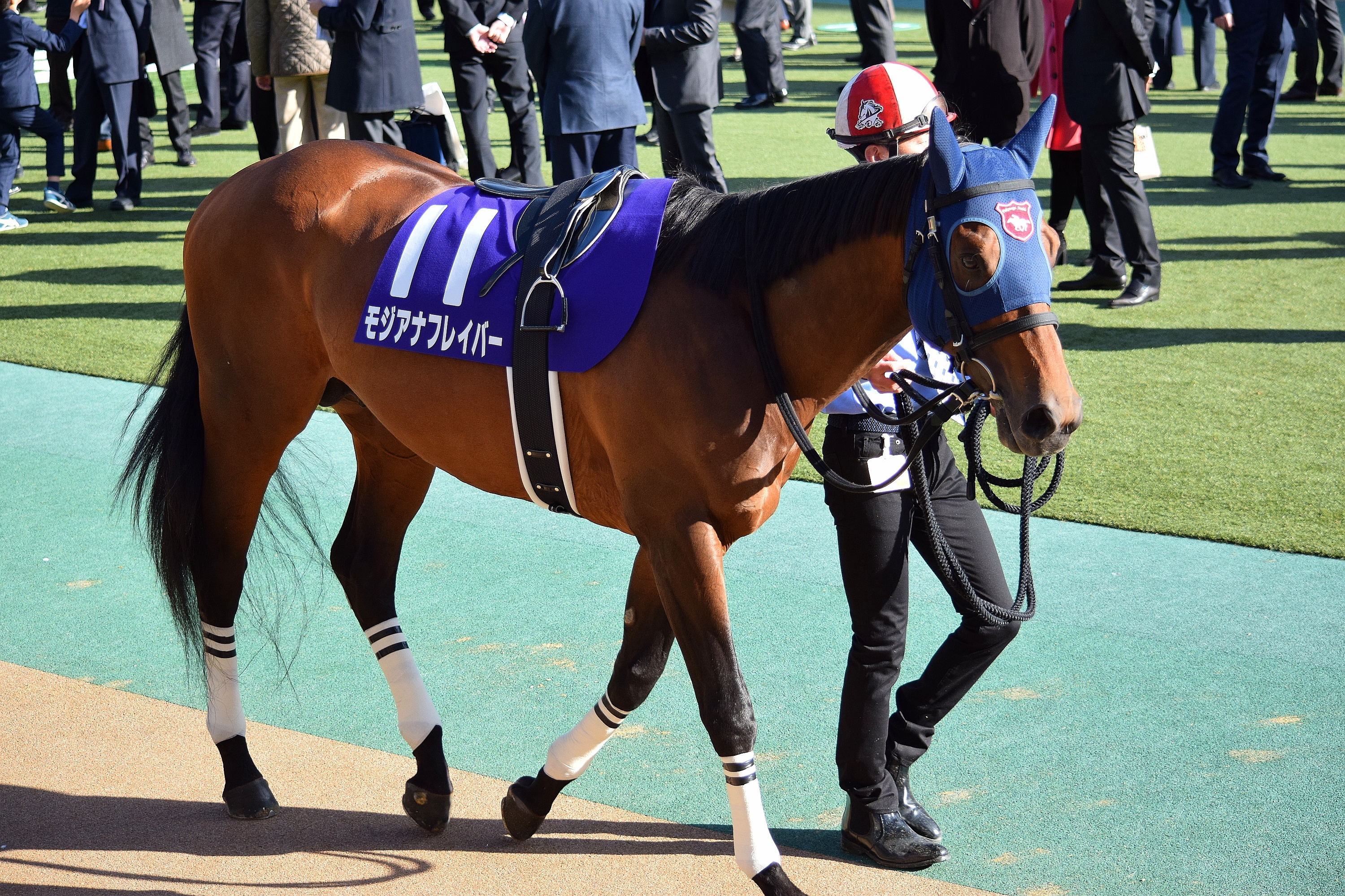 モジアナフレイバー 2020年フェブラリーステークス出走時